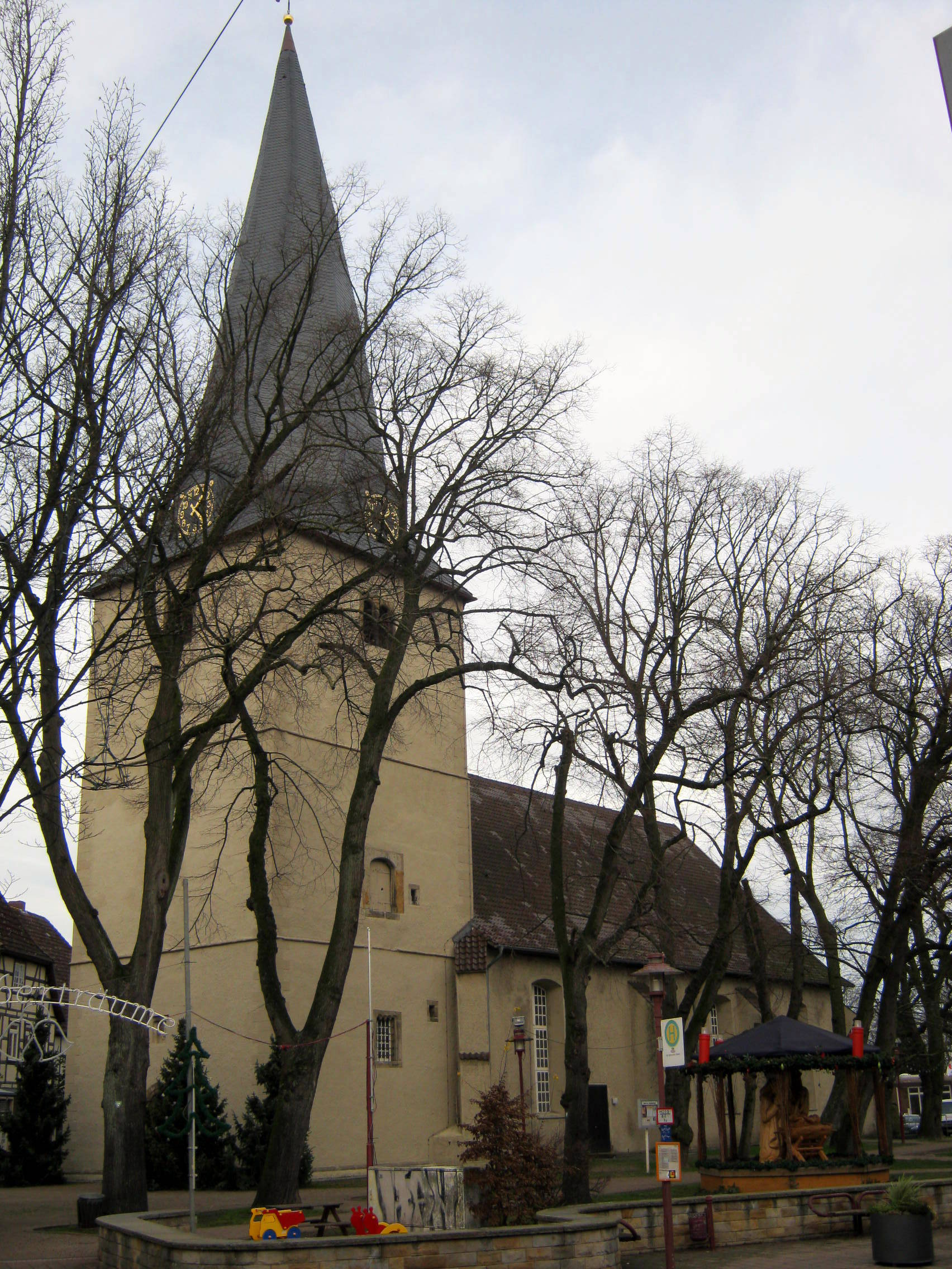 Die St. Johannis-Kirche in Rahden aus südlicher Richtung. This image shows a heritage building in Germany, located in the North Rhine-Westphalian city Rahden (no. 11).